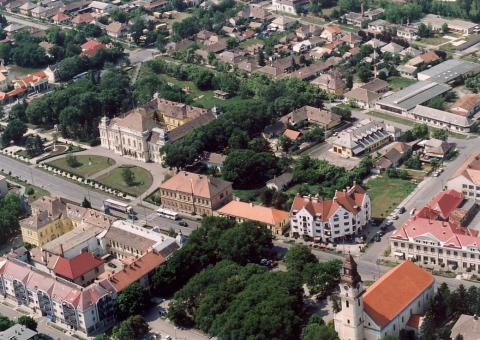 Kisújszállás, Hungary, aerialphotography